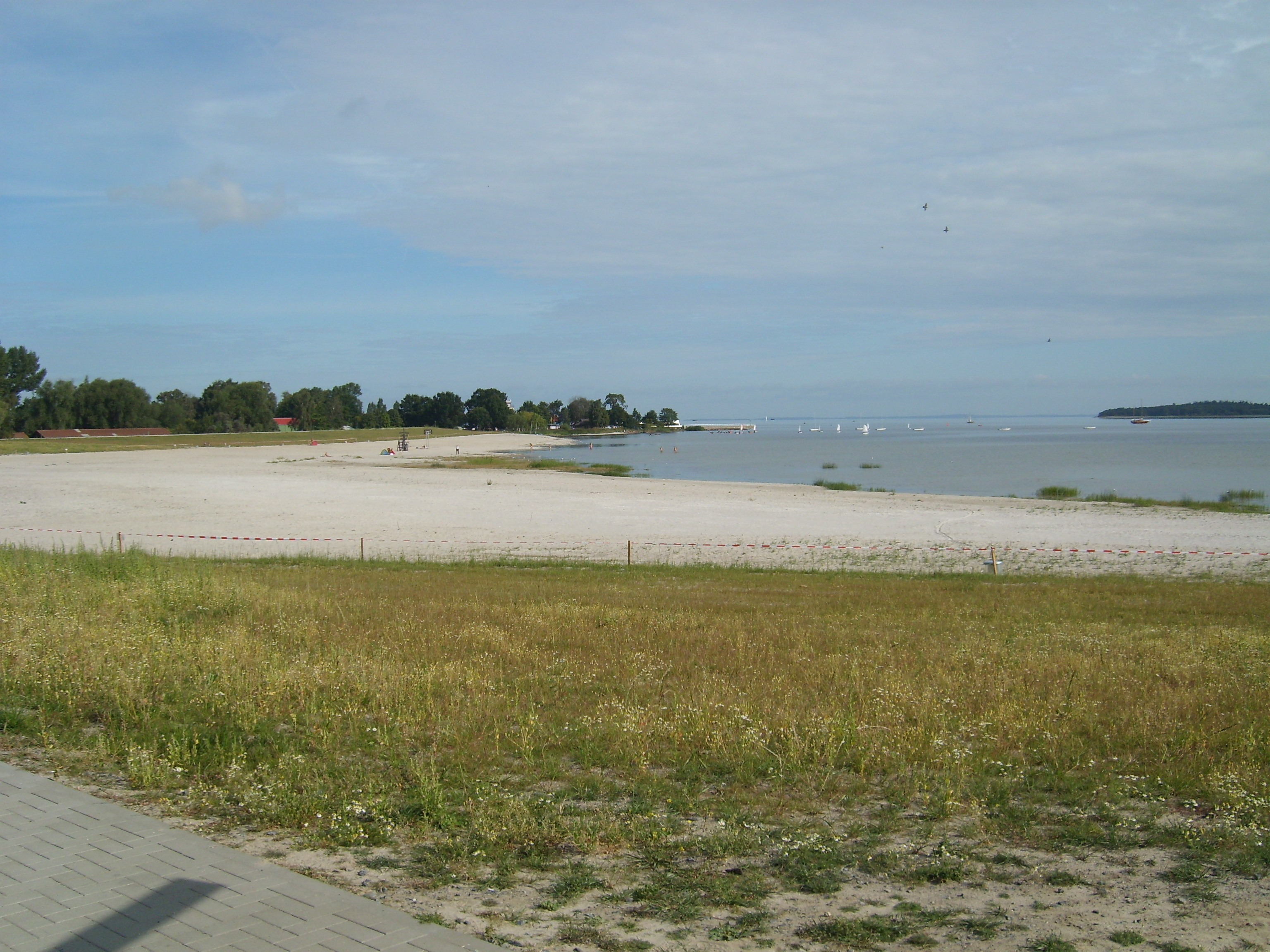 Blick von der Deichkrone des fertiggestellten Deiches Eldena nach Norden